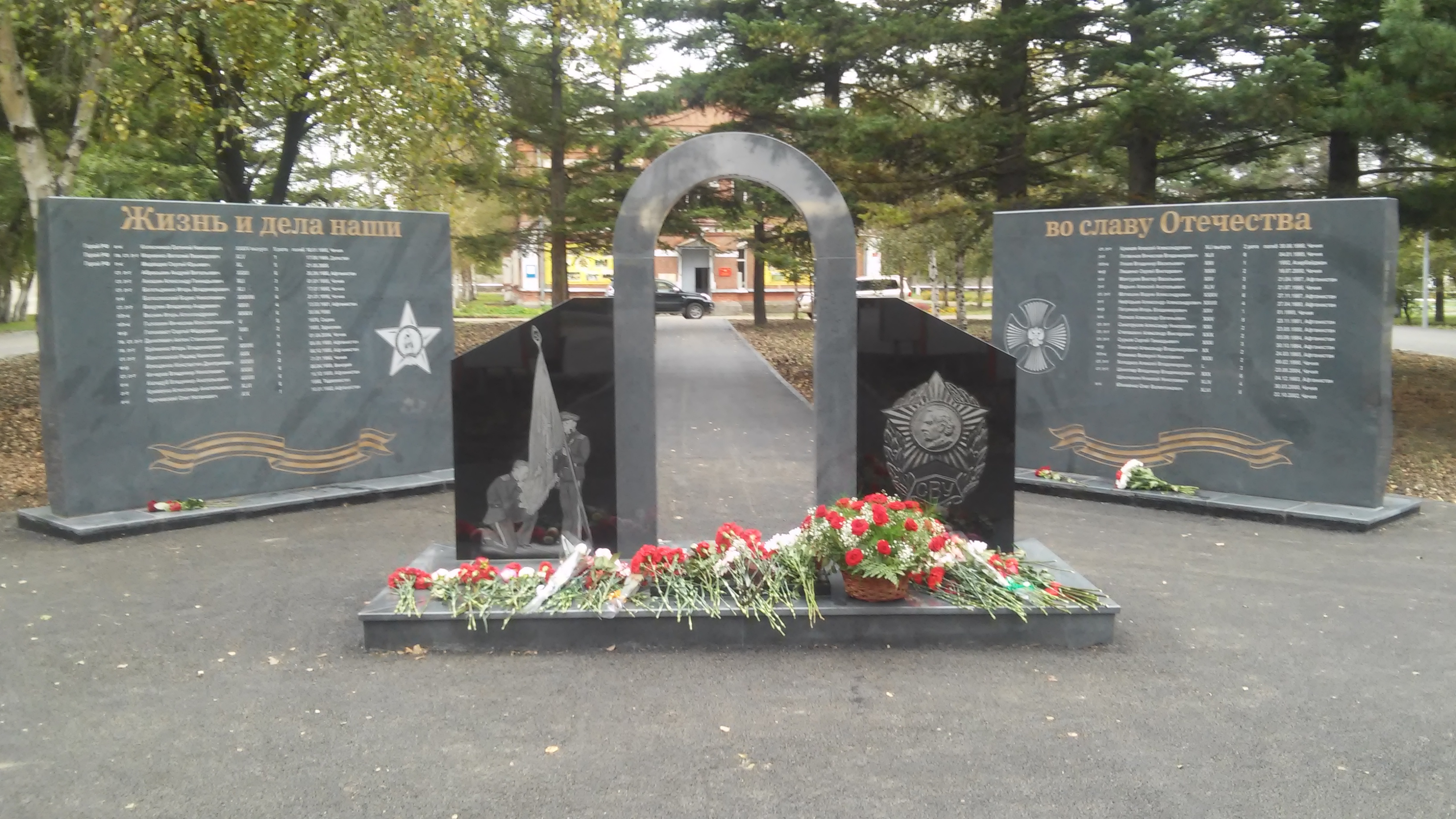 Памятник выпускникам училища, погибшим при выполнении воинского долга.